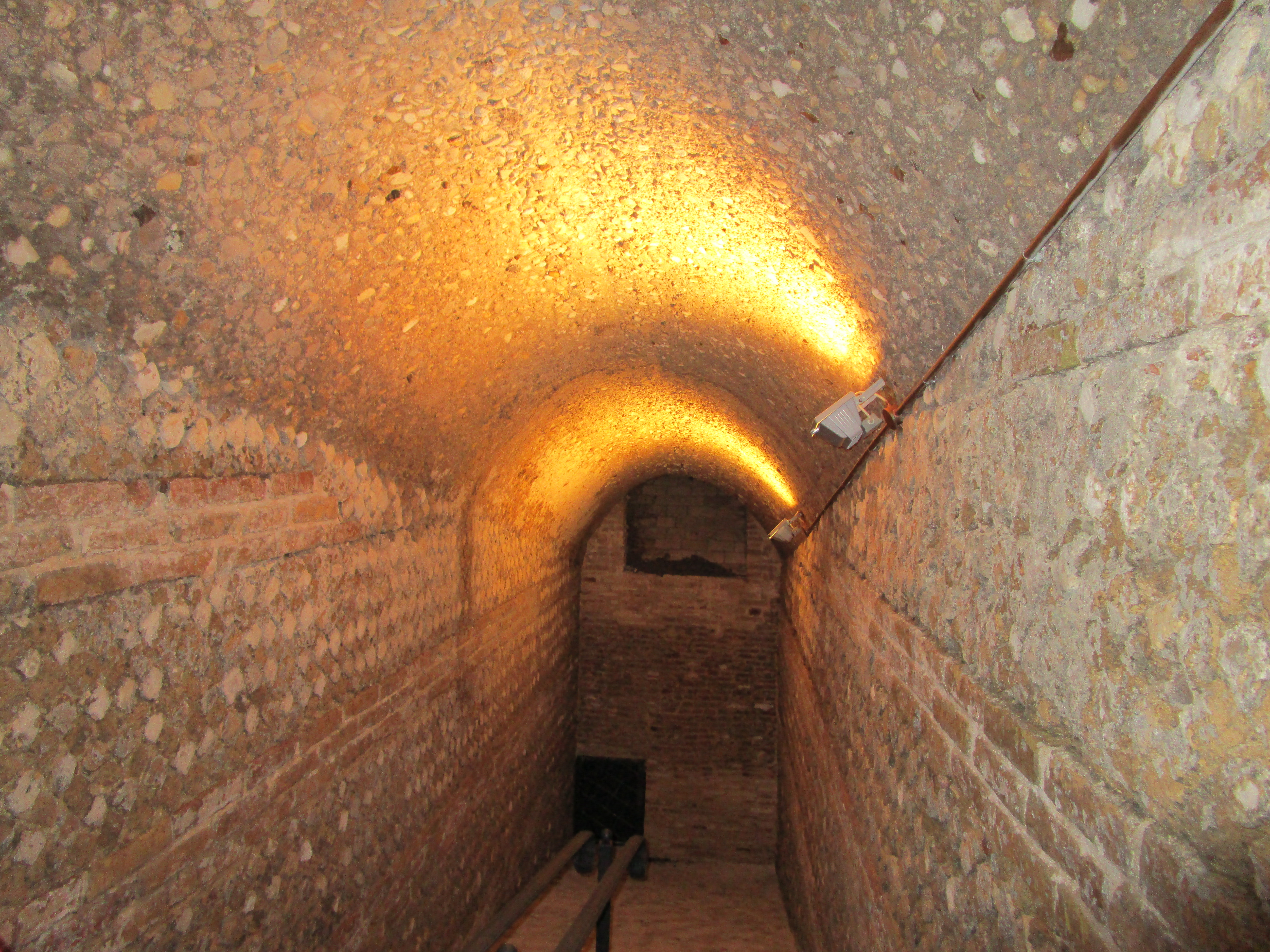 La Via Tecta è un passaggio sotterraneo costruito nell'antica Teate Marrucinorum, di cui non si conosce con certezza la funzione.